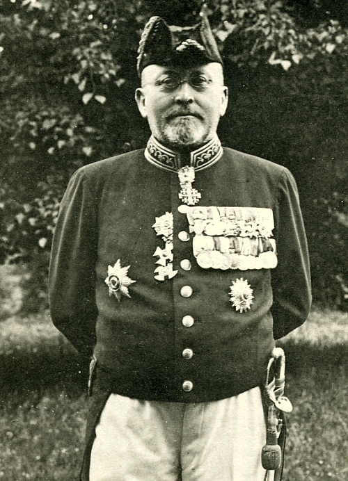 Arthur Achleitner, Bayerischer Schriftsteller